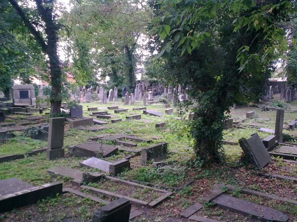 Zdewastowane nagrobki na cmentarzu żydowskim w Opolu